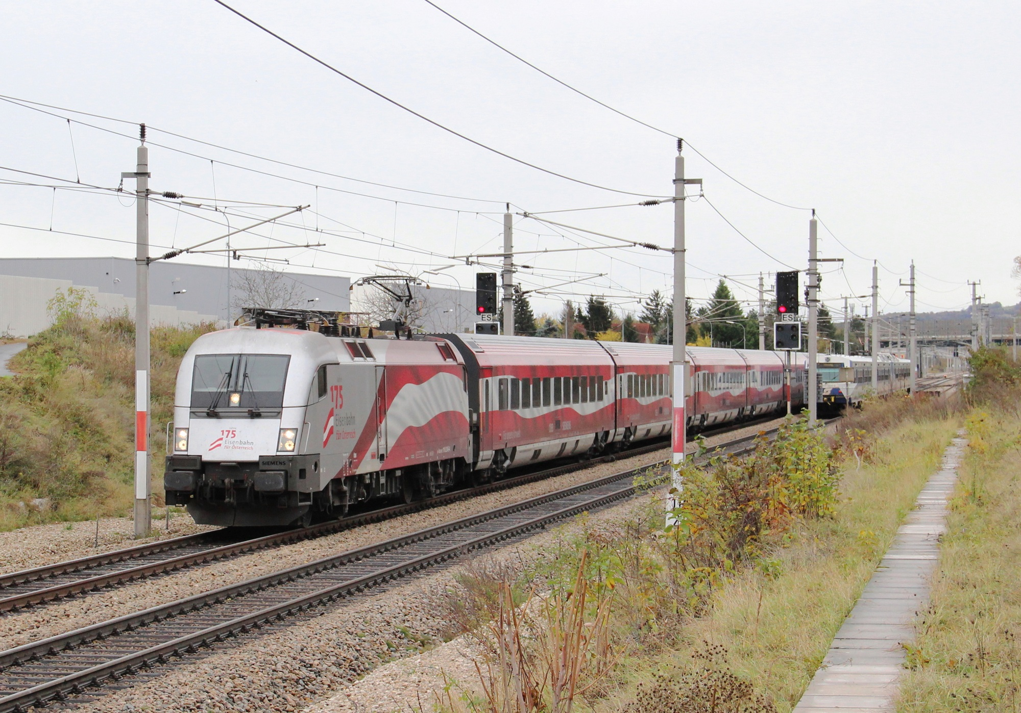 Die 1116.249 durchfährt mit ihrer Garnitur 49 "175 Jahre Eisenbahn für Österreich" die Haltestelle Perchtoldsdorf am Weg von Graz nach Wien Meidling als RJ 558.